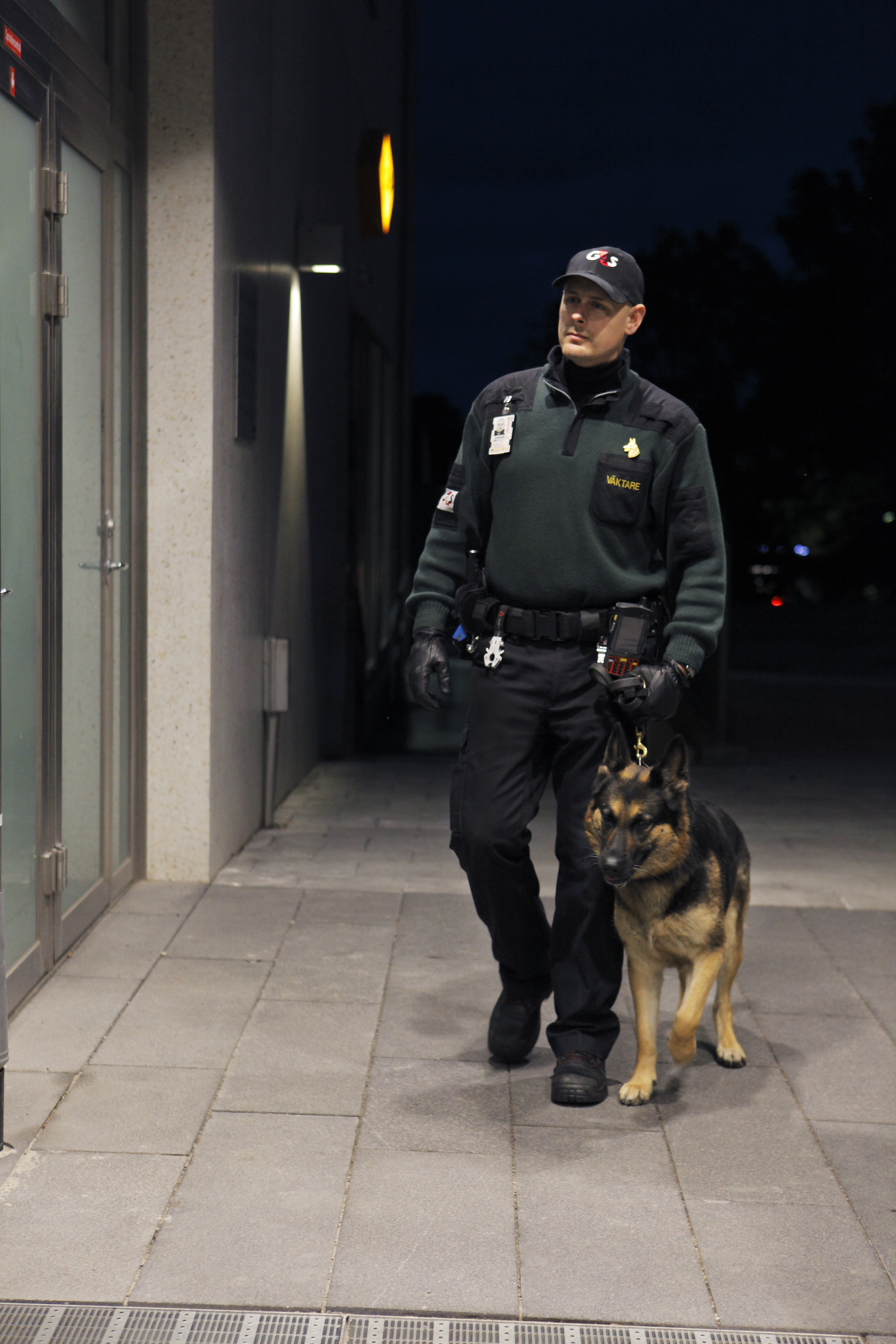 G4S väktare med hund. Fotograf: Johan Paulin